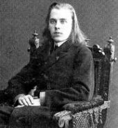 Константин Олимпов